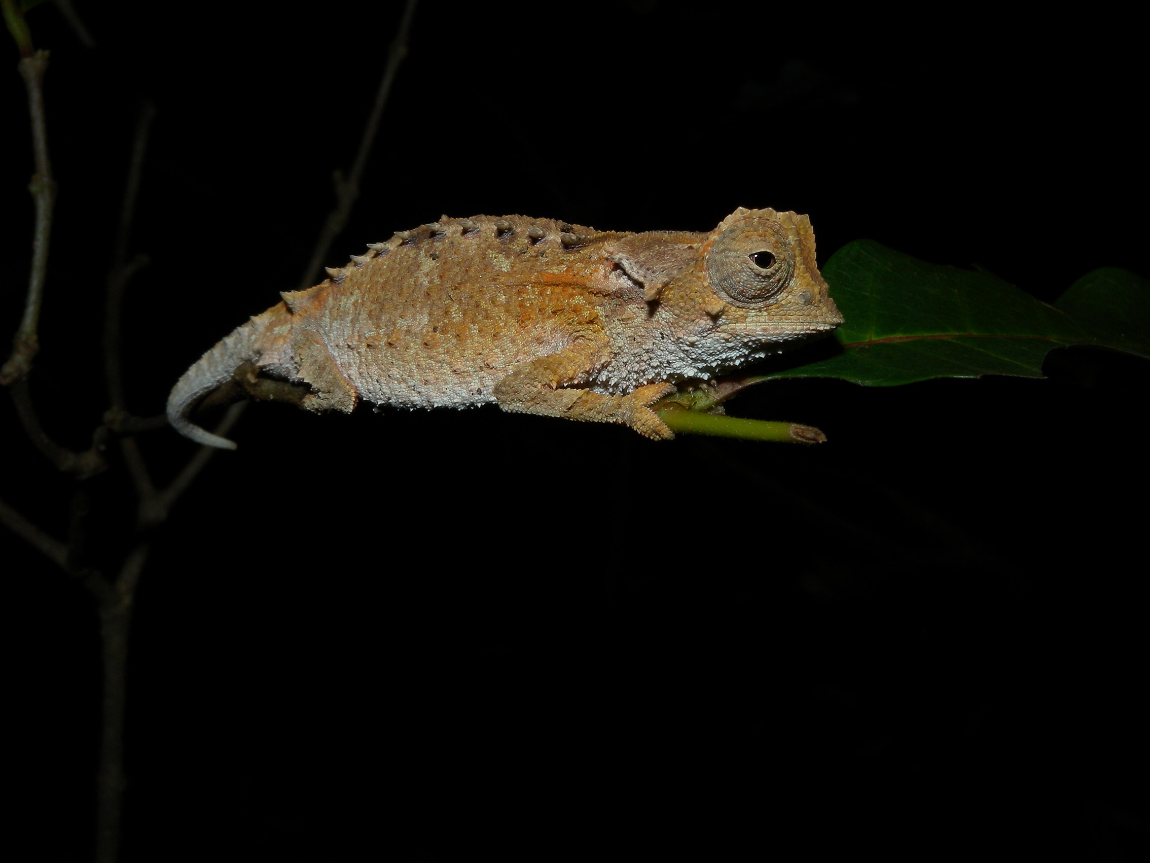 Brookesia decaryi, Ankarafantsika, Madagascar